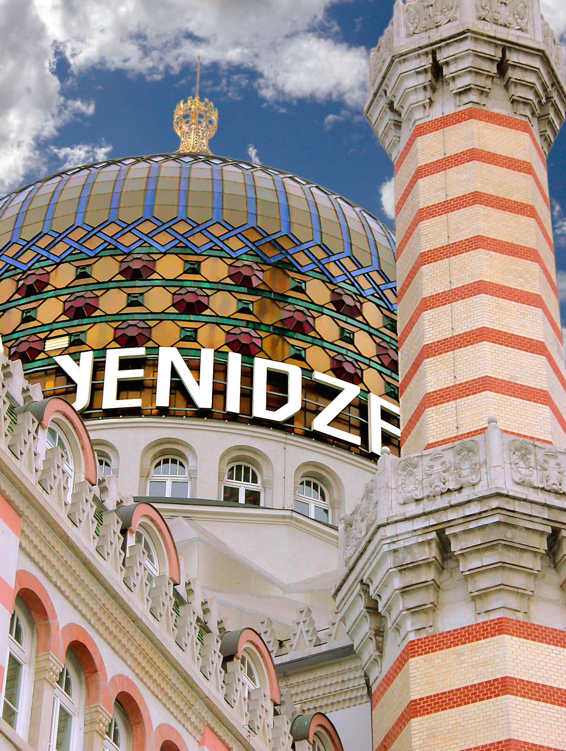 31.12.2006 01067 Dresden-Friedrichstadt: Weißeritzstraße 3 (GMP: 51.058981,13.726783): "Orientalische Tabak- und Cigarettenfabrik Yenidze". 1907-12 von Hermann Martin Hammitzsch entworfen und für den Fabrikanten Hugo Zietz errichtet. Die 20 m hohe Glaskuppel wird auch gastronomisch genutzt. [DSCN20324.TIF]20061231165DR.JPG(c)Blobelt